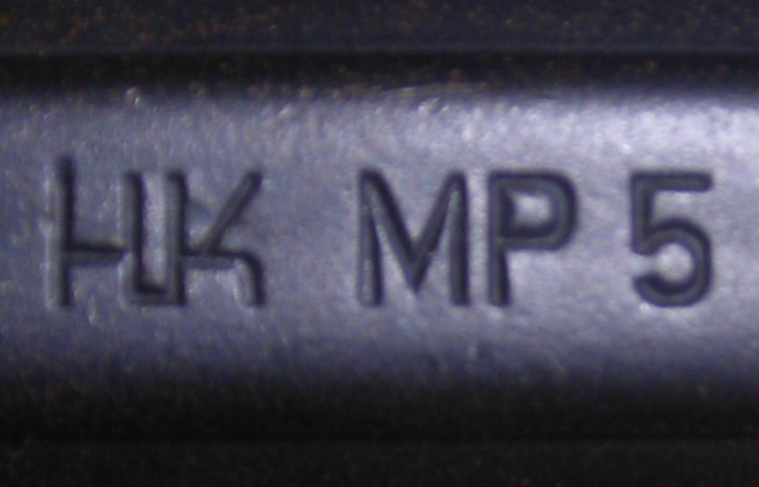 Gestanzter Schriftzug HK MP5